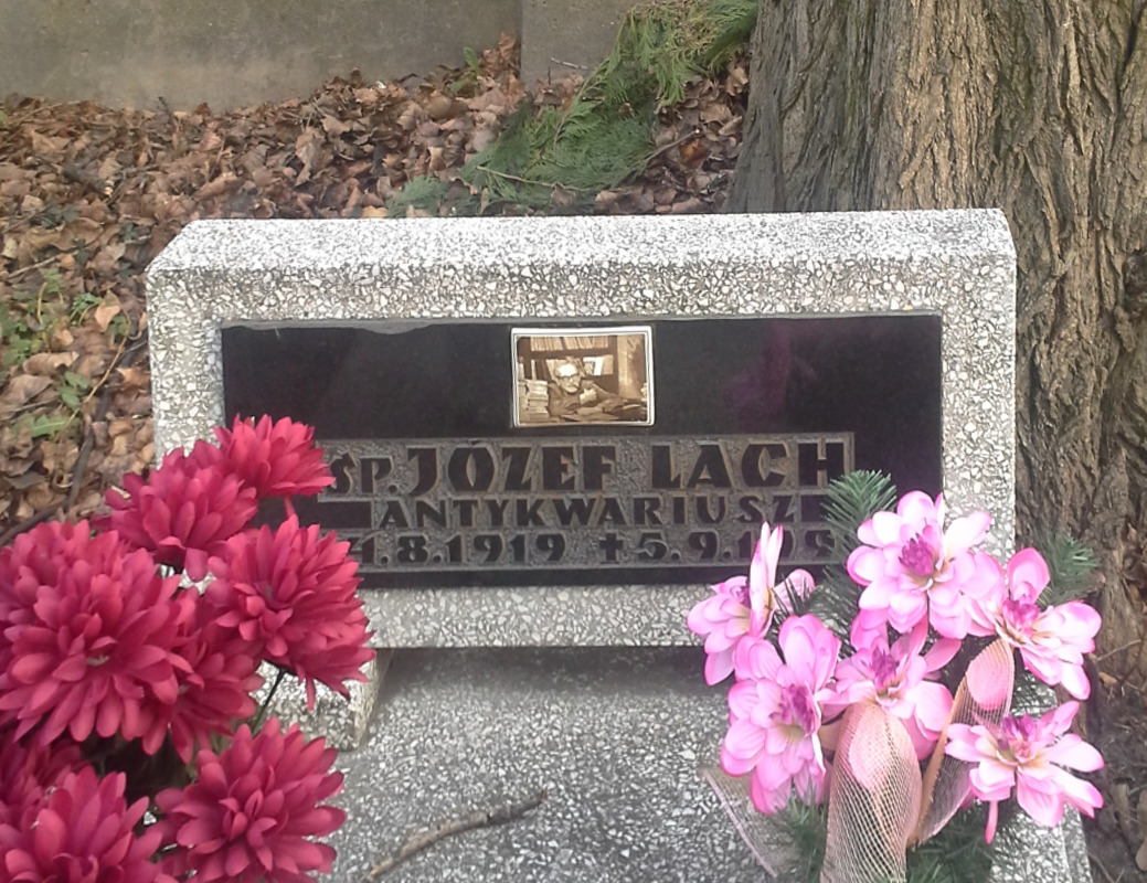 Nagrobek Józefa Lacha, antykwariusza, na cmentarzu w Katowicach